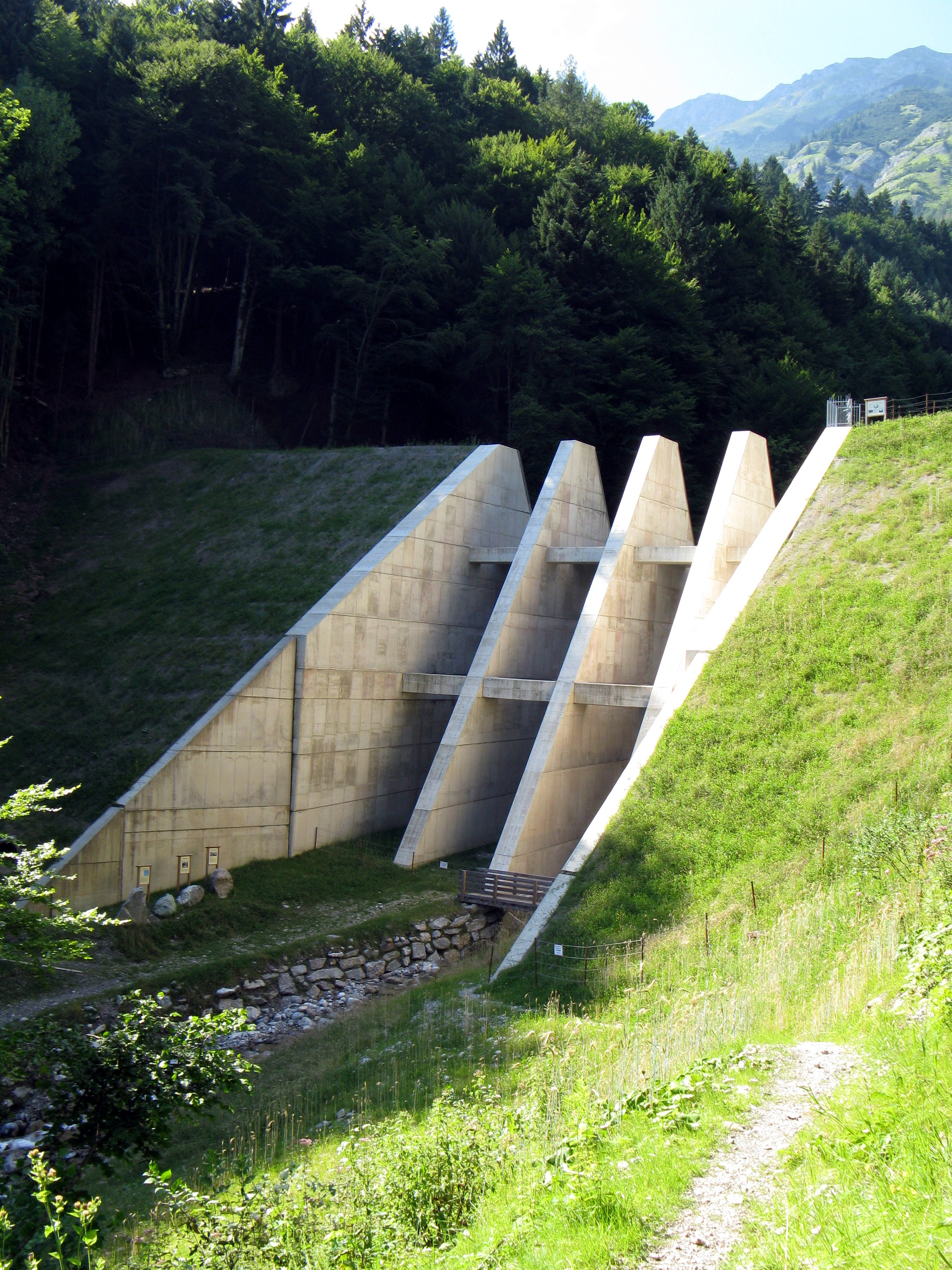 Lawinenbremsbauwerk oberhalb von Mühlau in Innsbruck, erbaut 2003-2007